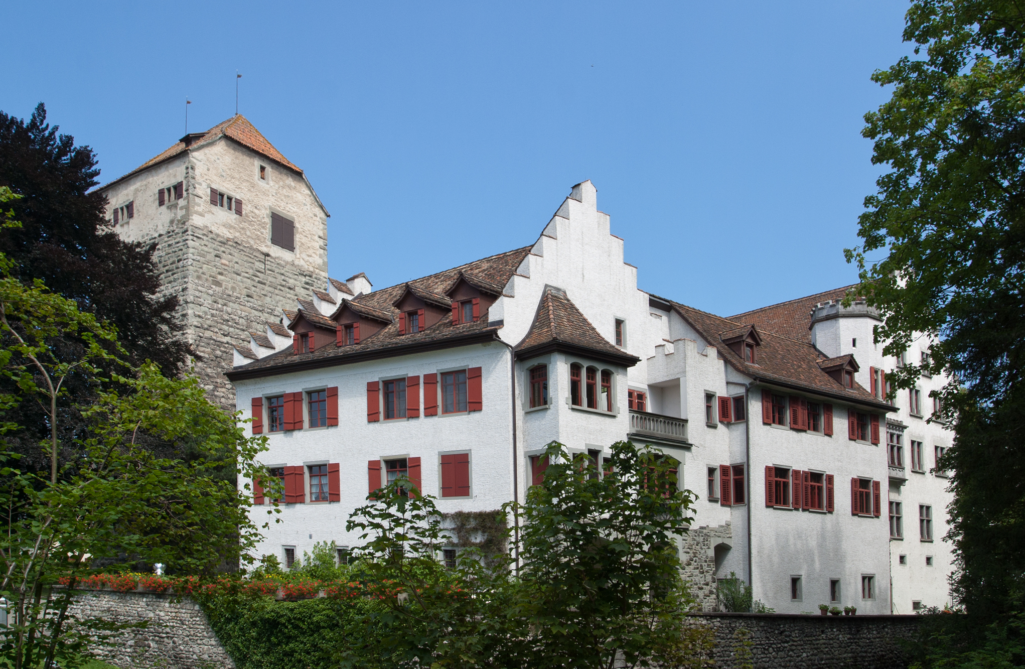 Schloss Arbon